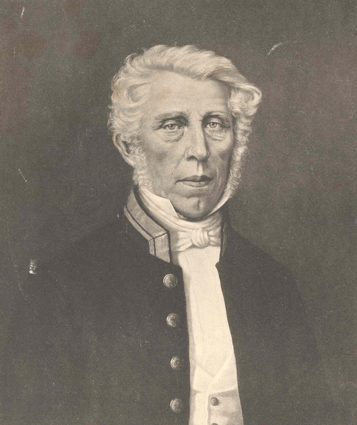 Henrik Johan Paus (1799-1893), foged, onkel til Henrik Ibsen